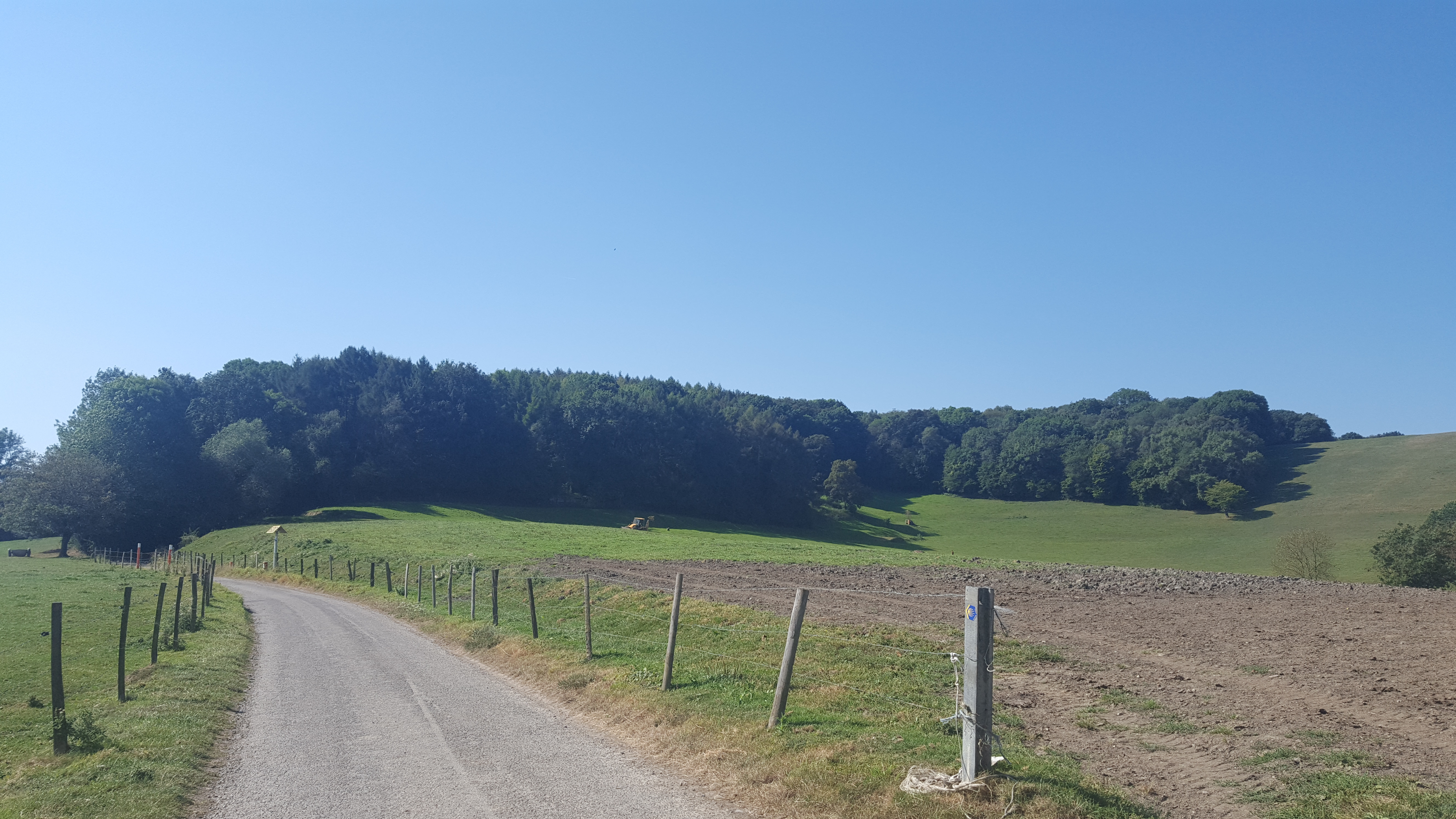 Bois de Hees (partie), Welkenraedt, Belgique